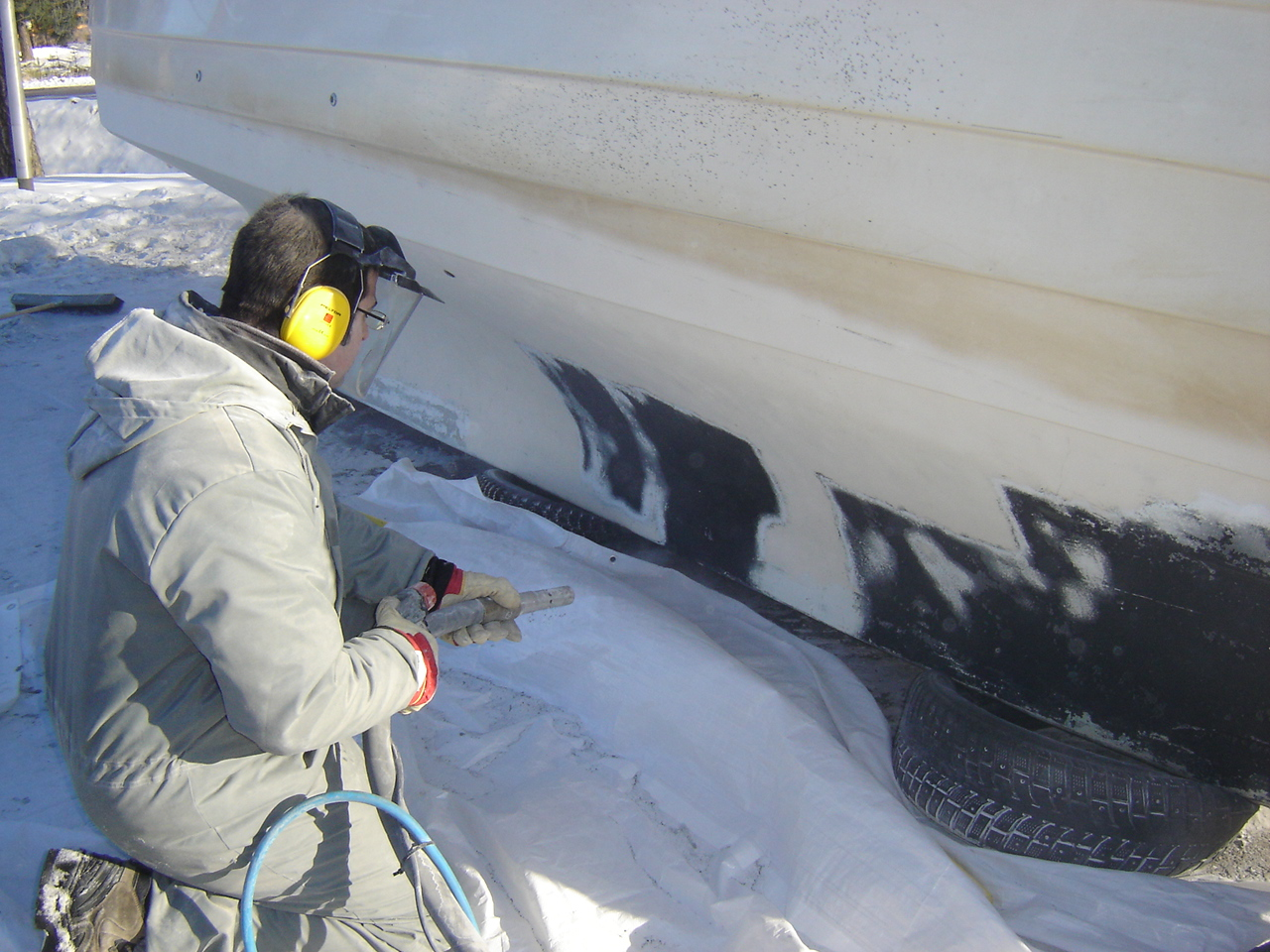 Inkoo, Suomen Soodapuhallus Oy, yrittäjä työssä